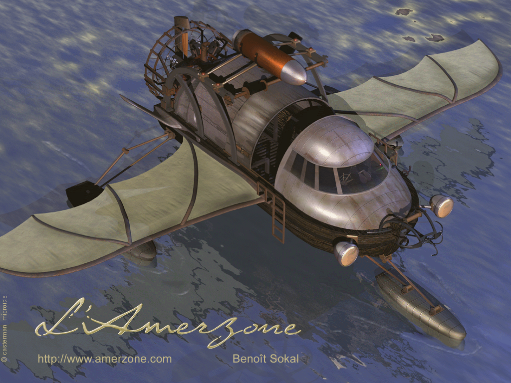 Capture d'écran du jeu vidéo L'Amerzone (1999), développé et édité par Microïds.